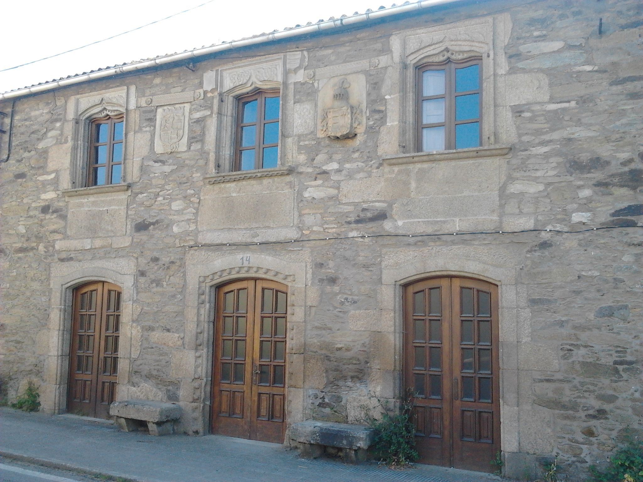 Casa Gótica na que Felipe II pernoctou de camiño a embarcar na Coruña para casar coa raíña María de Inglaterra no ano 1554